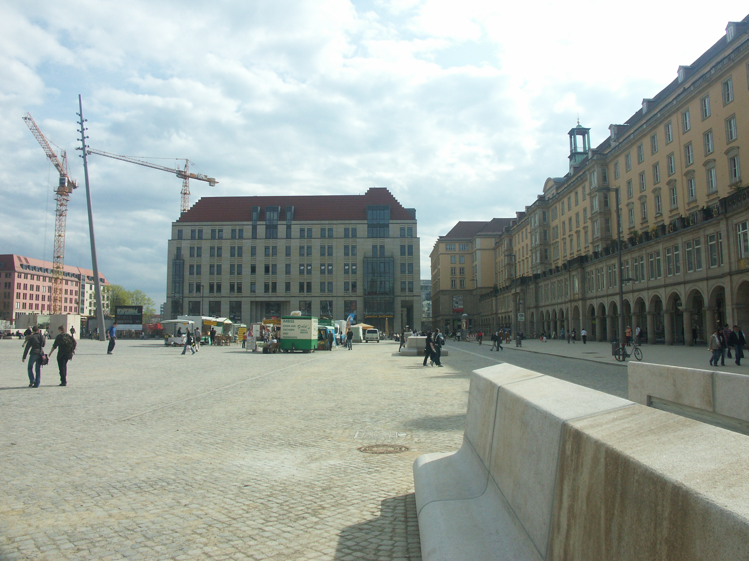 Altmarkt Dresden in Richtung Prager Straße